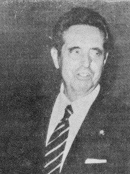 Alfonso García-Gallo, historiador del Derecho